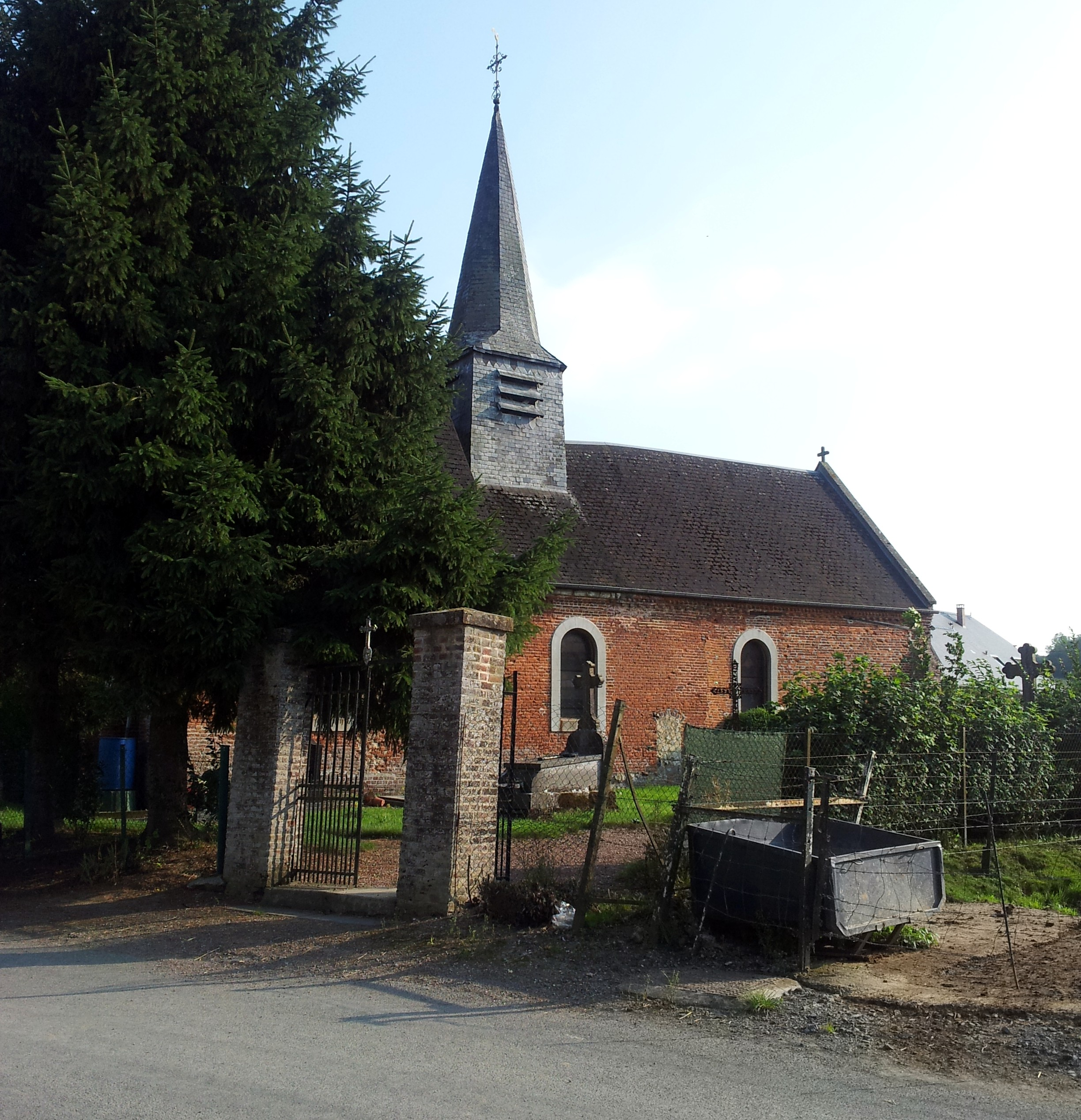 Église de Voharies